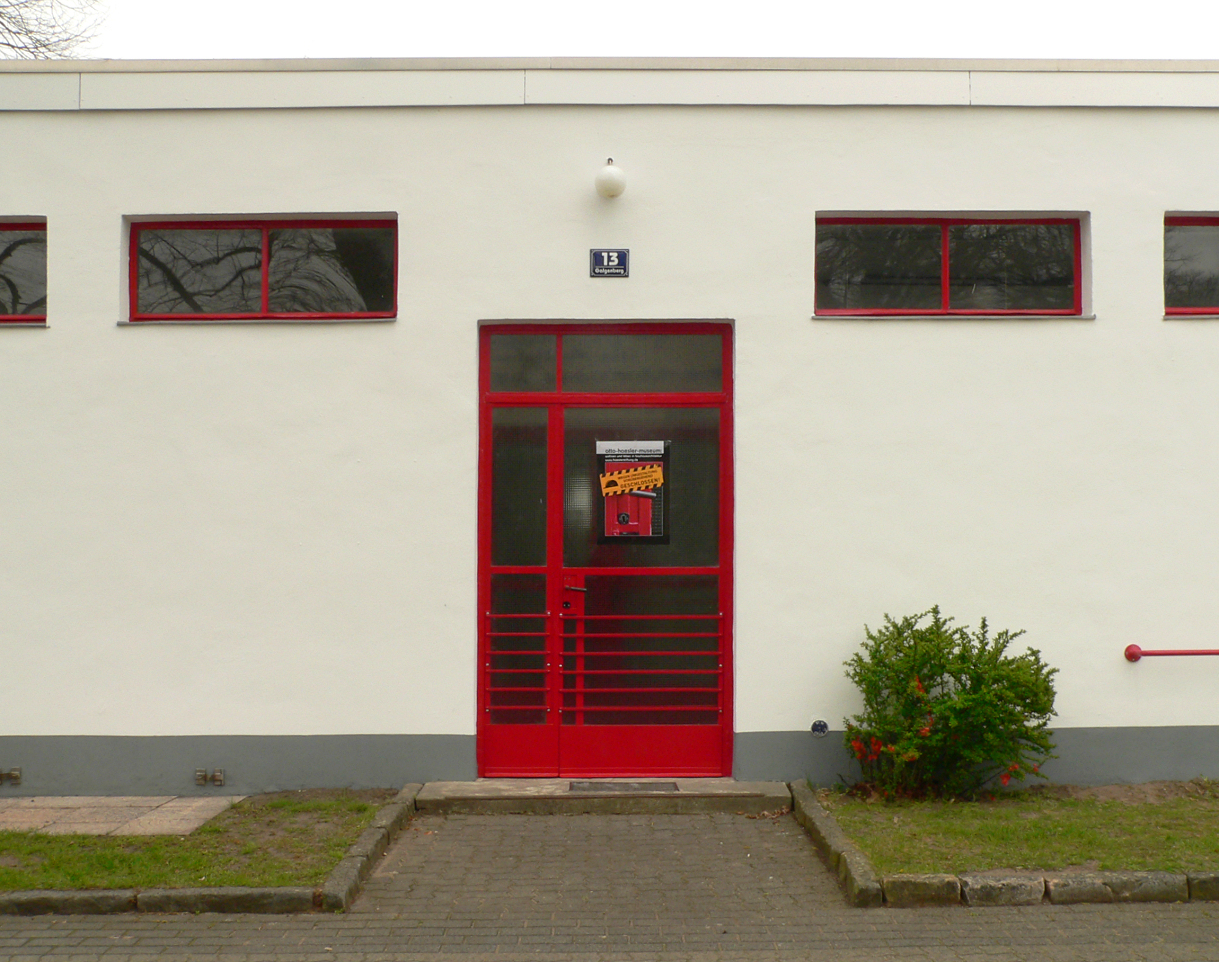 Eingang des Otto Haesler Museums in der Siedlung Blumläger Feld in Celle